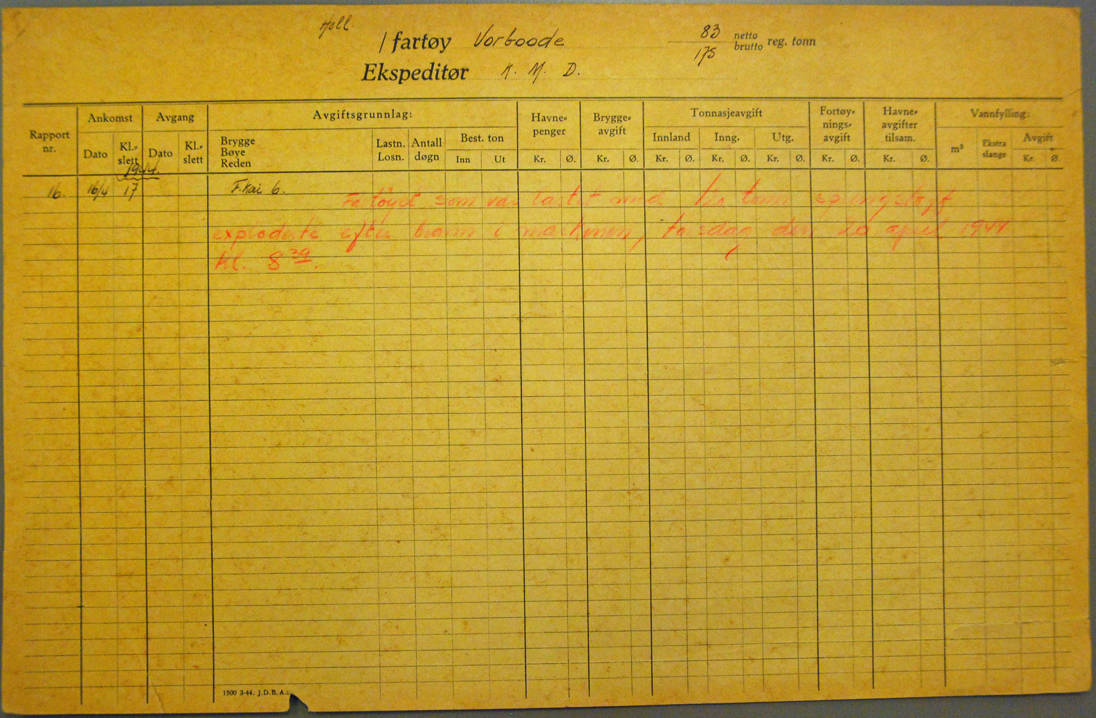 Fartøyskjema til skipet Voorbode (VL 103), av Vlaardingen, Nederland. Skipets last eksploderte 20. april 1944, kl. 08.39. Bergen byarkiv. Arkiv A-0742. Arkivskaper: Bergen kommune, Havnekontoret / Havnefogden. Serie Hac - Fartøyskjema 1941 - 1975. Hac 0063. Arkivstykkets innhold: Vines - Whitecoat 1941 - 1975.